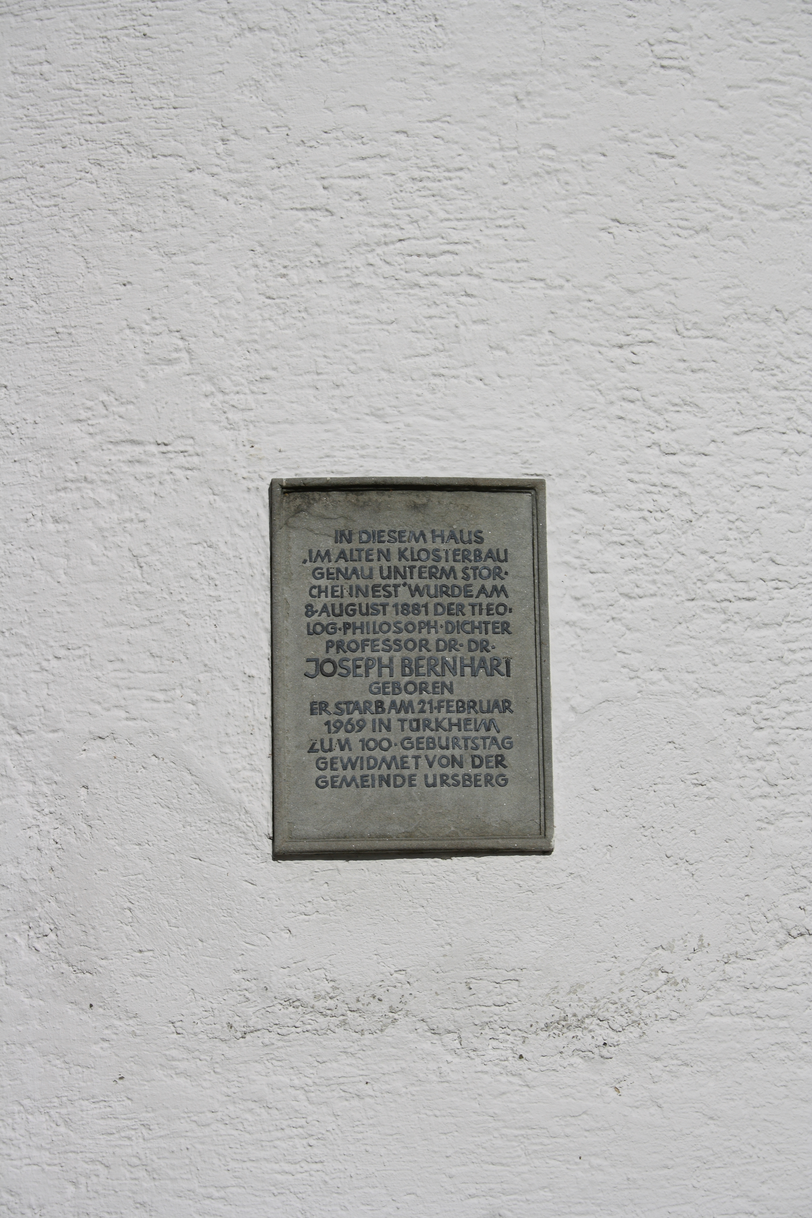 Kloster Ursberg in Ursberg im Landkreis Günzburg (Bayern), Gedenktafel für Joseph Bernhart